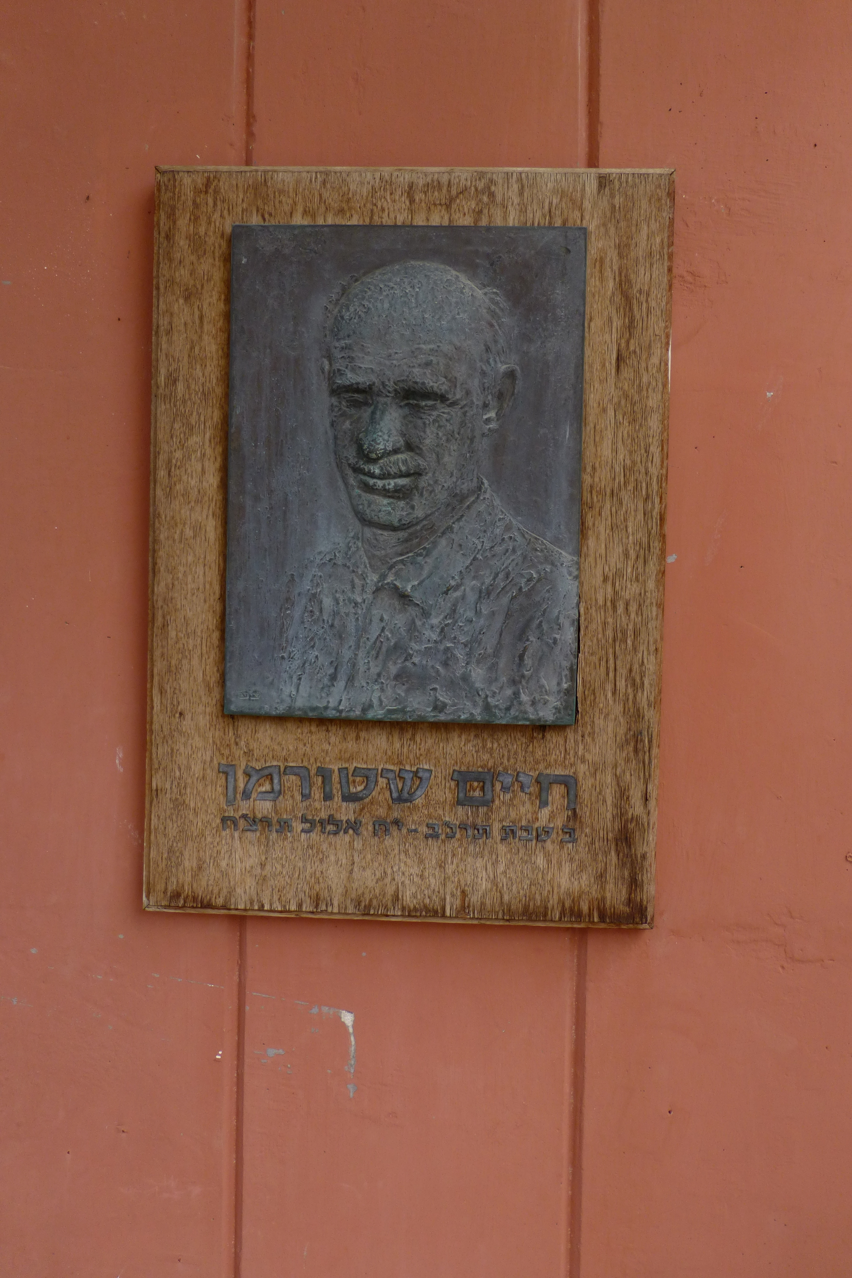 מוזיאון בית שטורמן המצוי בקיבוץ עין חרוד מאוחד נוסד בשנת 1941 על ידי חבר הקיבוץ שמואל סבוראי כמוזיאון לטבע.